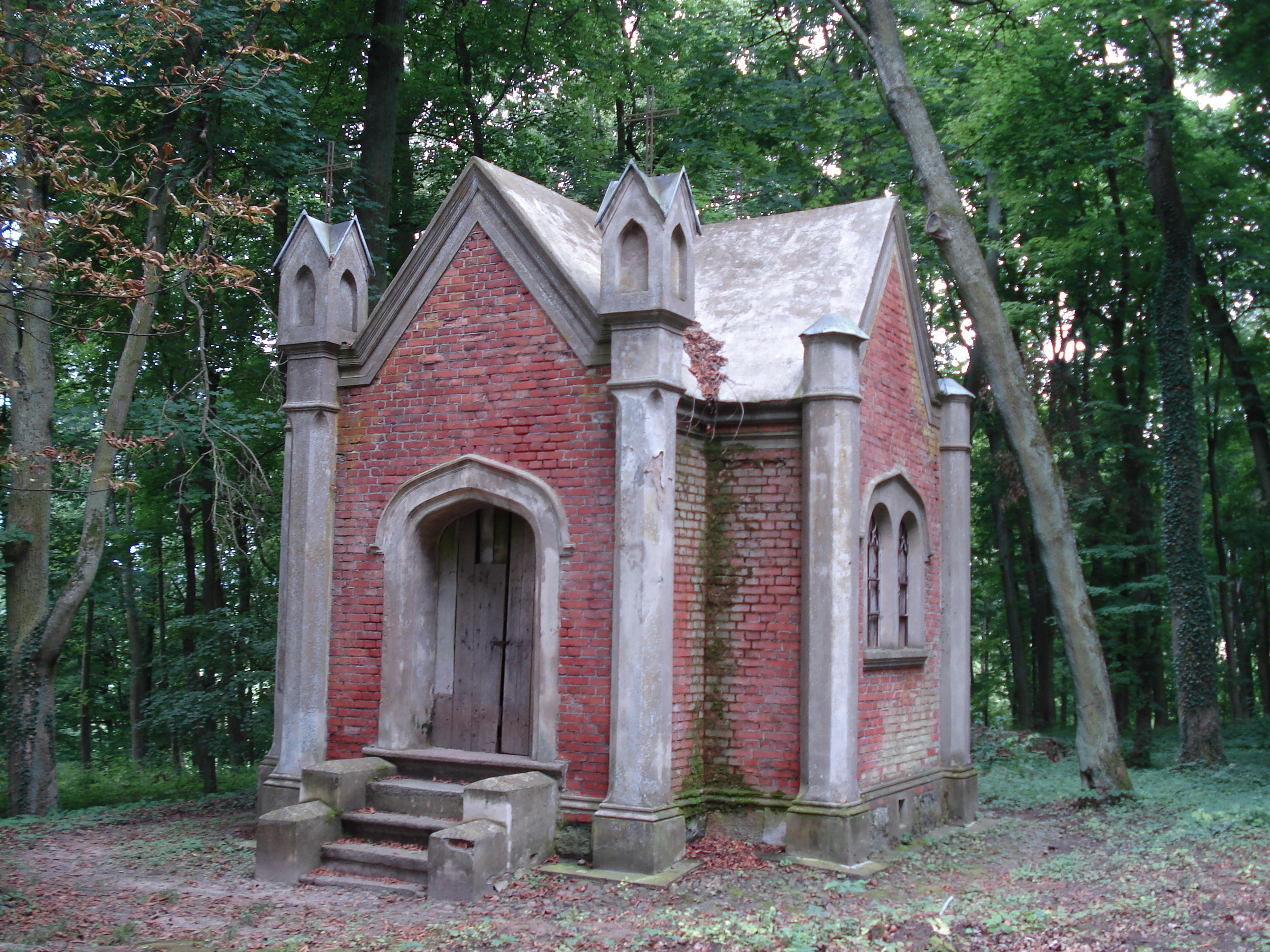 Neogotycka XIX w. kaplica von Redeckerów w parku w Nakomiadach.